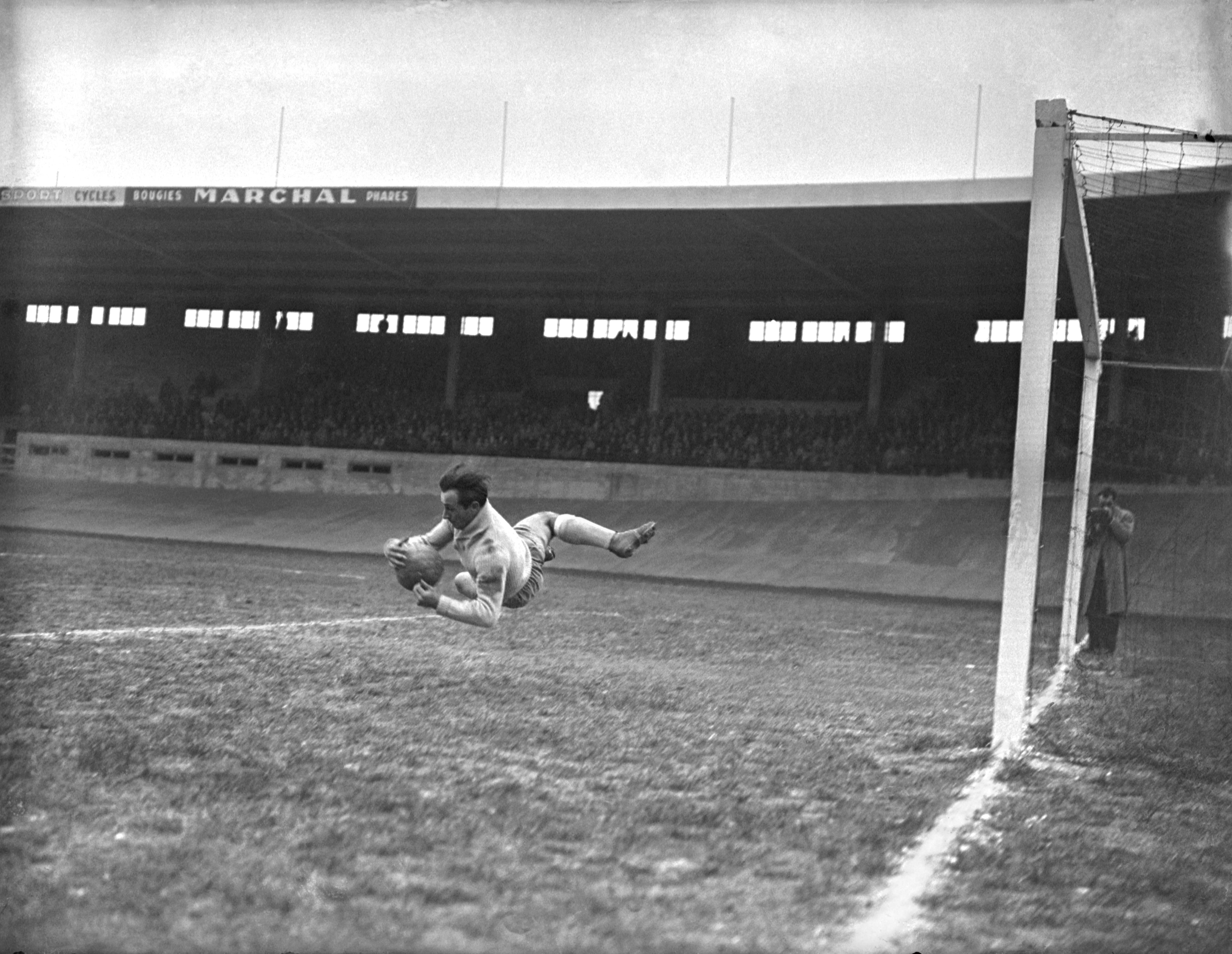 Stadium municipal de Toulouse, 1bis allées Gabriel-Biénès. 15 Janvier 1950. Vue du gardien stéphanois Eugène Verbrugghe arrêtant un tir toulousain lors du match opposant le Toulouse Football Club à l'Association Sportive Saint-Étienne Observation: Négatif du tirage contact 53Fi6345.